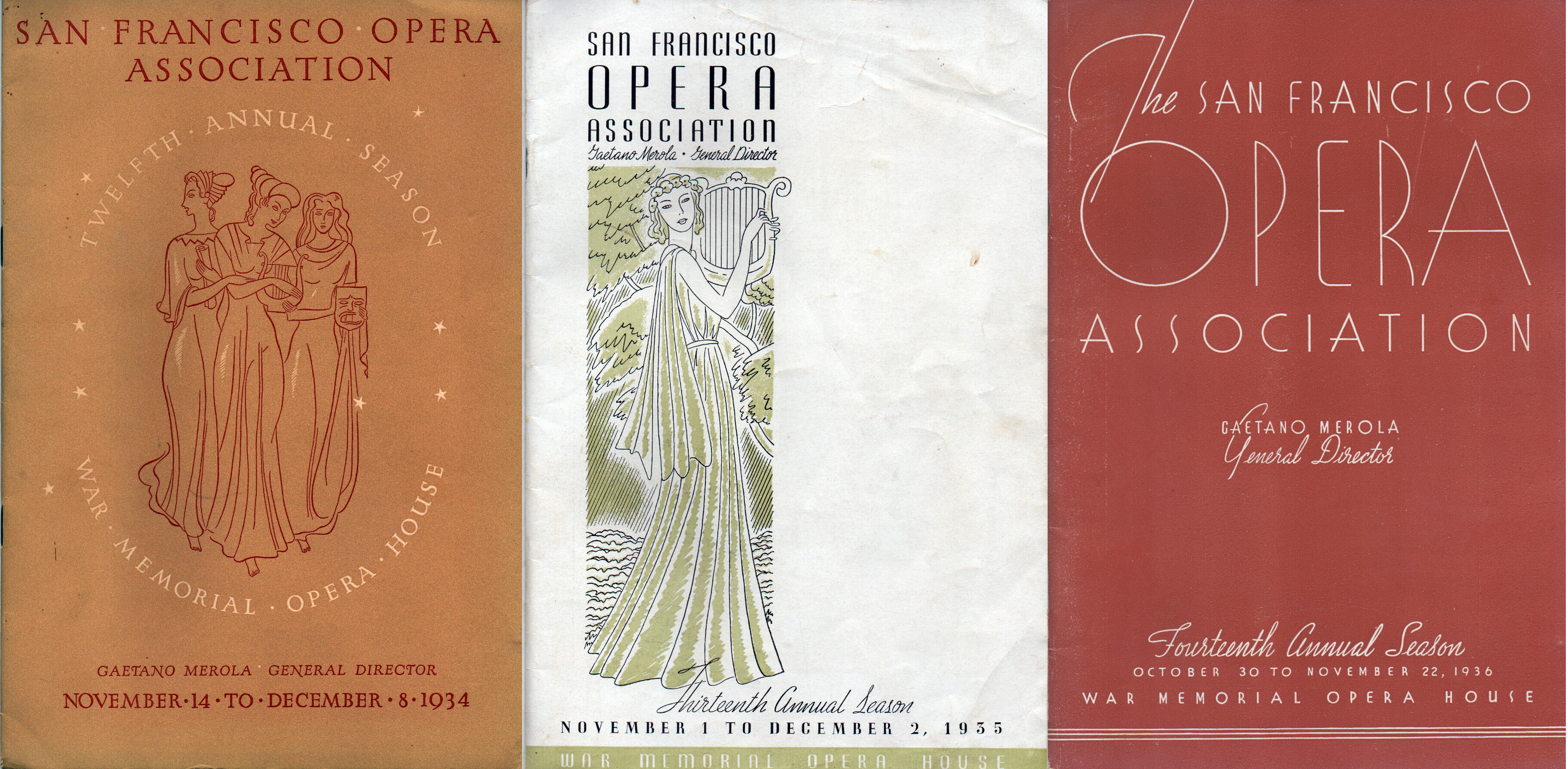 San Francisco Opera Association program covers, 1934-36